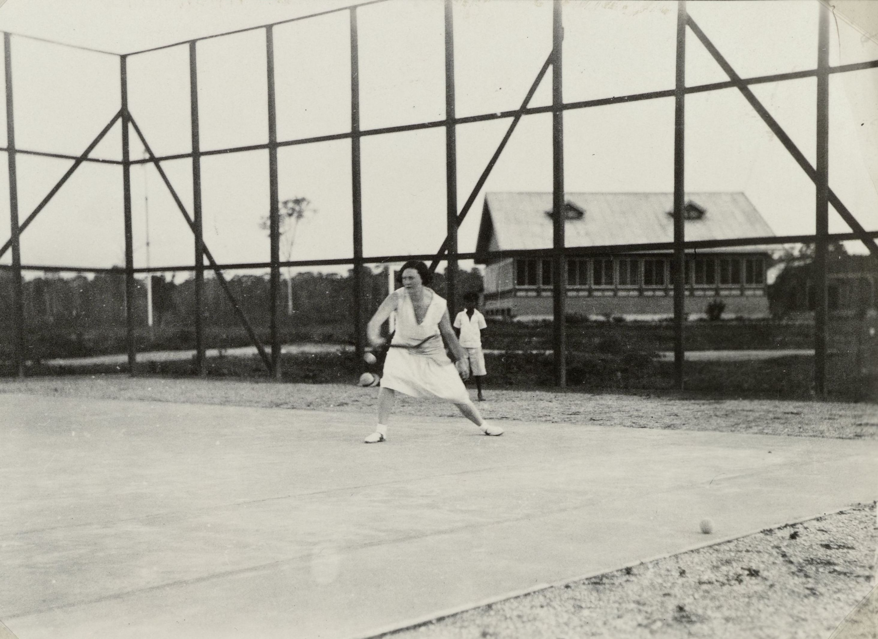 IdentificatieTitel(s): Edith Jetten op de tennisbaanObjecttype: foto Objectnummer: NG-2009-93-11-2Omschrijving: Edith Jetten op de tennisbaan. Foto met hoekjes bevestigd op een bladzijde van een albumblad in het fotoalbum over de familie Jetten en het leven en werken in de mijnstad Moengo in Suriname rond 1927.VervaardigingVervaardiger: fotograaf: anoniemPlaats vervaardiging: SurinameDatering: 1925 - 1927Materiaal: fotopapier Techniek: fotografieAfmetingen: h 60 mm × b 90 mmOnderwerpWat: tennis, lawn-tennisWanneer: 1925 - 1927Waar: SurinameMoengoWie: familie JettenVerwerving en rechtenCredit line: Schenking van mevrouw D. Jetten, AmsterdamVerwerving: schenking 8-jul-2009Copyright: Publiek domein